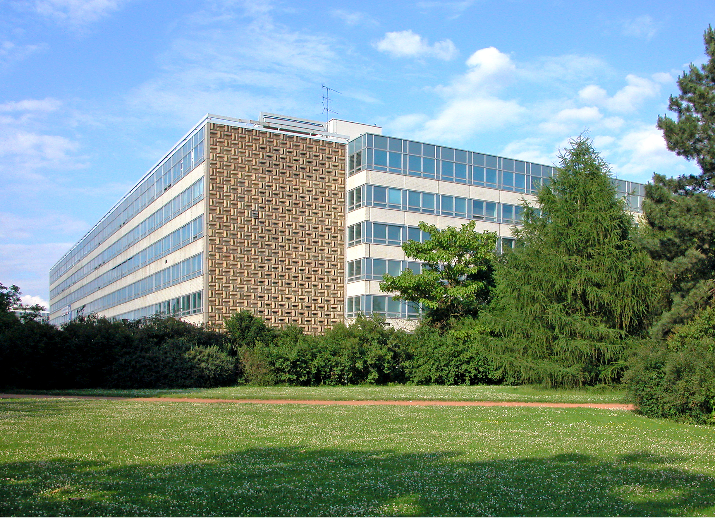 20.06.2009 01069 Dresden: ROBOTRON-Bürohaus Bürgerwiese, auch Atrium I genannt, St. Petersburger Straße 15 (GMP: 51.045347,13.743314). Südlicher Teil des ROBOTRON-Komplexes. Erbaut ab 1969. Sicht von Südwesten vom Georgenplatz. 2016 wird es abgerissen. [DSCN37971.TIF]20090620005DR.JPG(c)Blobelt